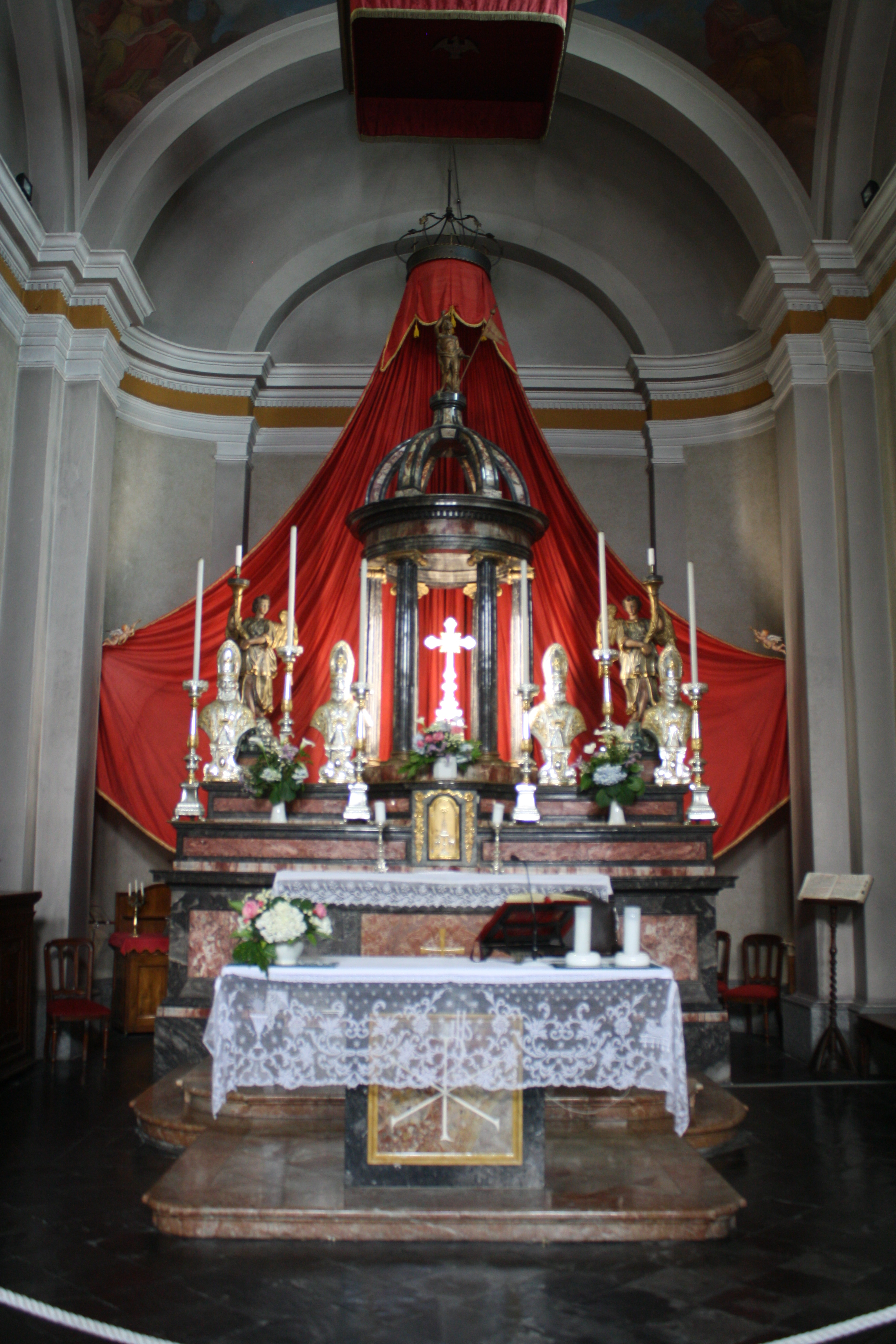 L'altare della chiesa di San Tommaso di Canterbury a Dervio, in località Corenno Plinio. This is a photo of a monument which is part of cultural heritage of Italy.